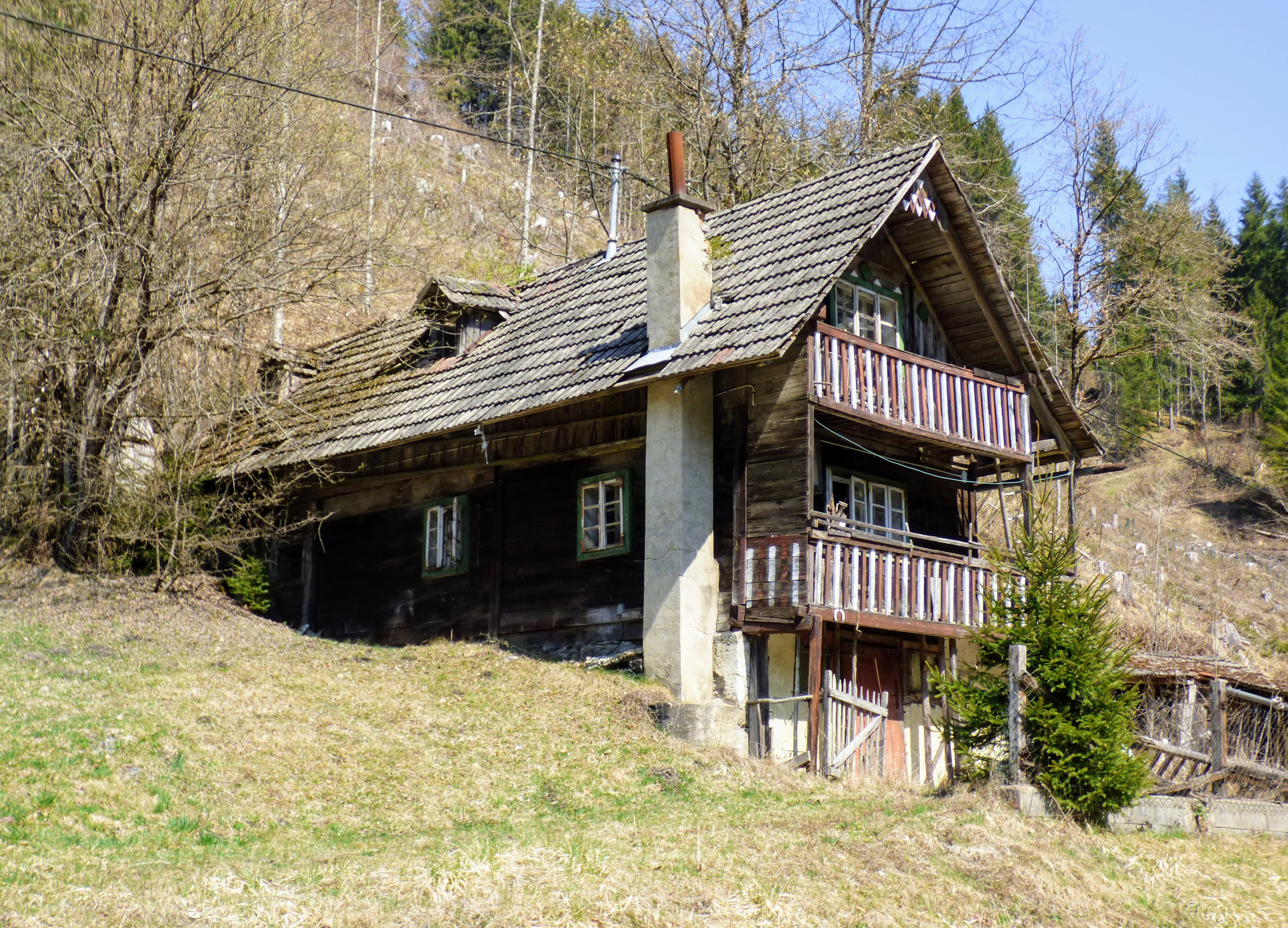 Äußere Wimitz Nr. 7 Gemeinde Frauenstein, Kärnten